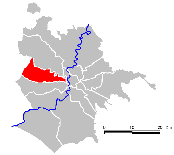 Municipio Roma XIII